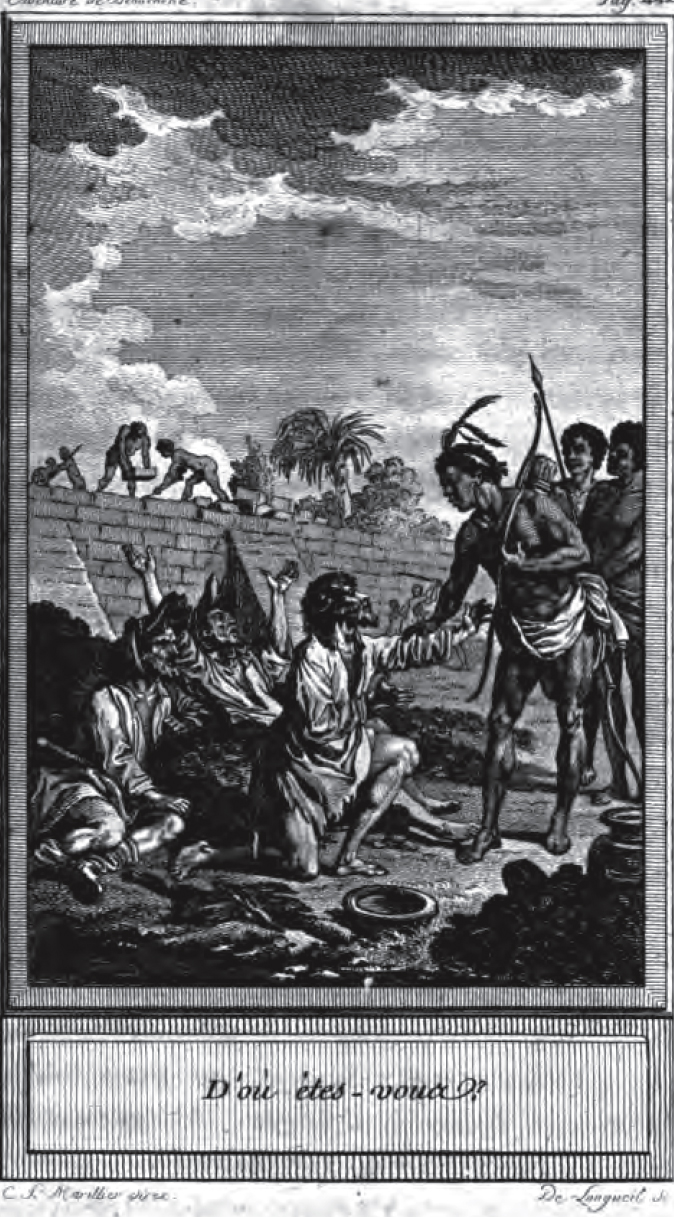 Alain-René Lesage's Histoire de Gil Blas de Santillane